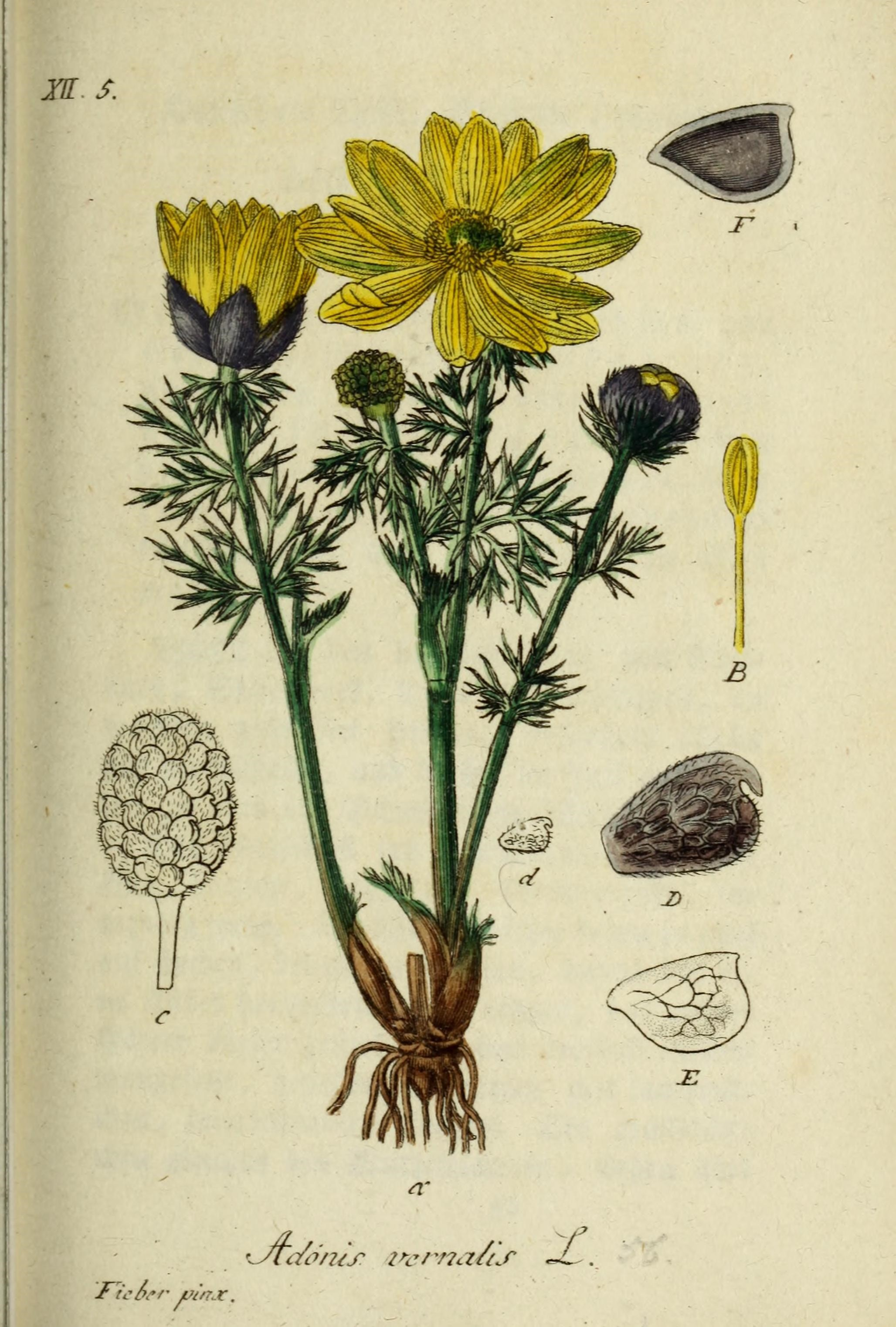 Deutschlands flora in abbildungen nach der natur /